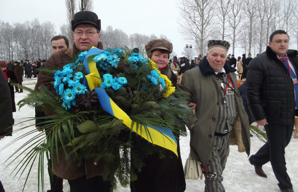 Zdjęcie zrobione podczas 68. rocznicy wyzwolenia nazistowskiego obozu koncentracyjnego KL Auschwitz - Birkenau.